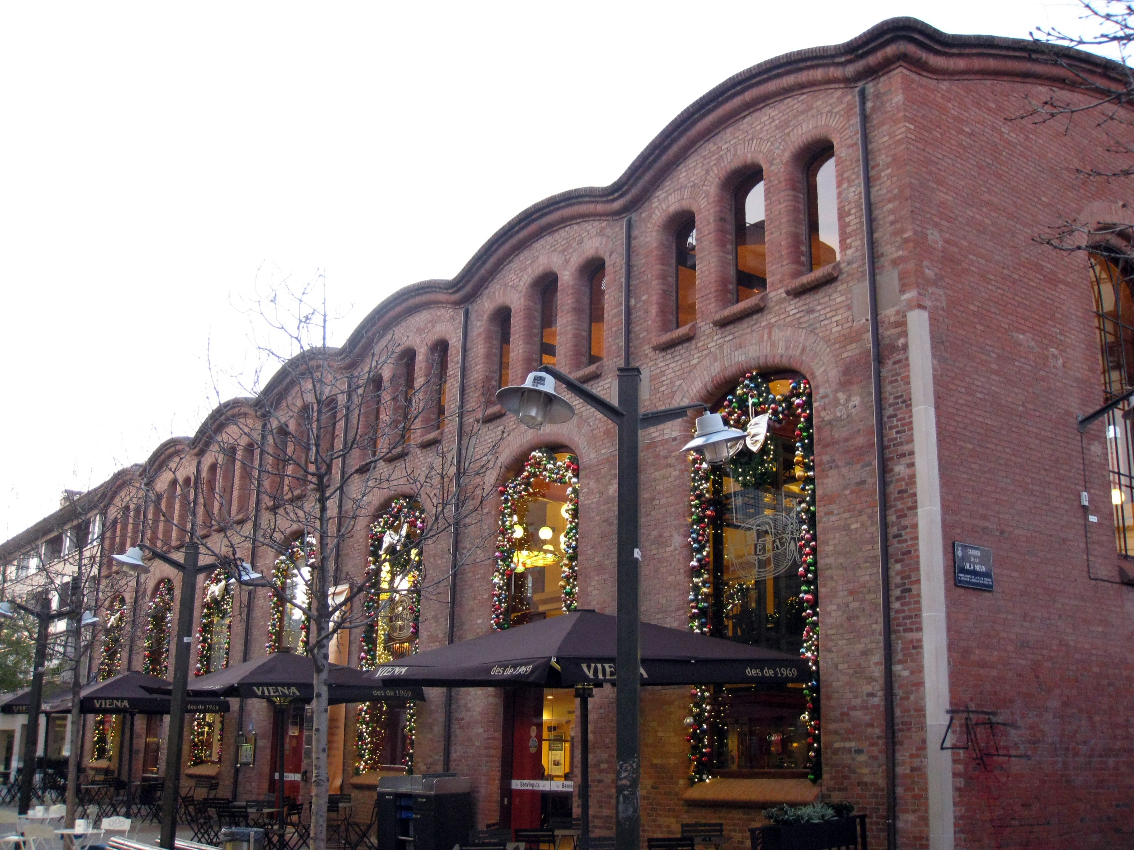 Societat General d'Electricitat, edifici de Lluís Muncunill del 1908 al carrer de la Unió, cantonada amb Joan Coromines, amb guarniments de Nadal. Actualment hi ha un restaurant. Vista de la façana del carrer de Joan Coromines.